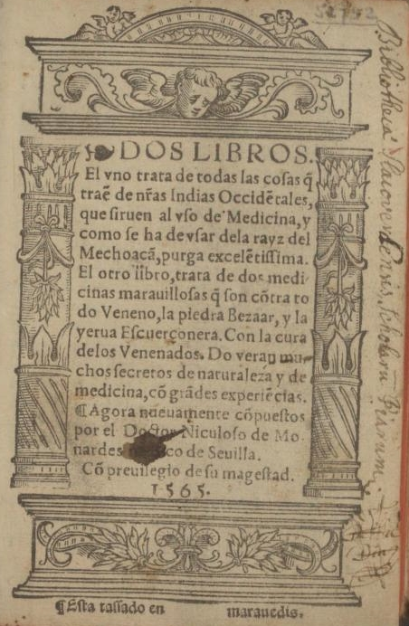 Nicolas Monardes, Dos libros, 1565, title page